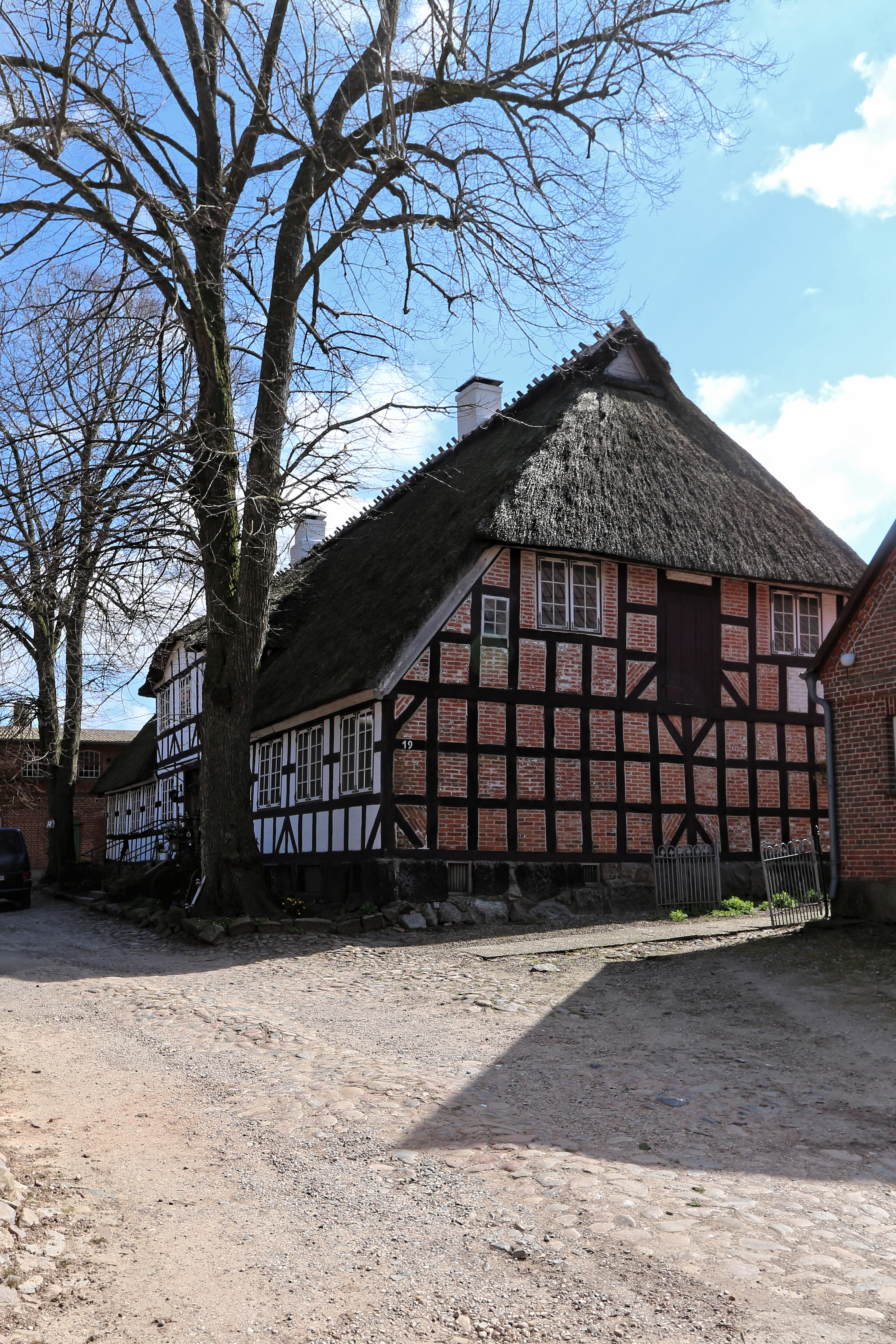 Scheggerott, Dorfstr.19; Wohnhaus